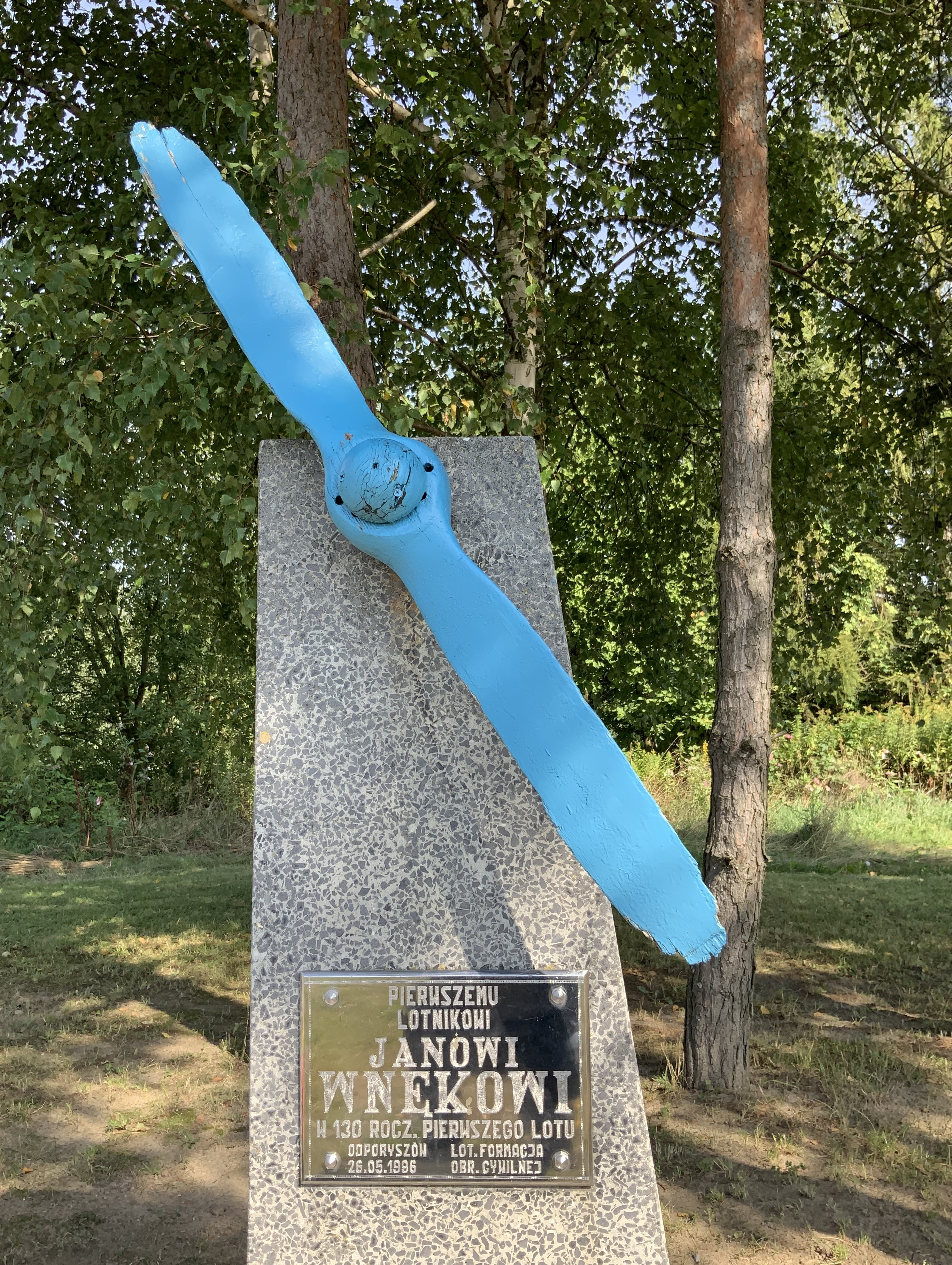 Pamiątka lotów Jana Wnęka w miejscowości Morzychna k. Odporyszowa